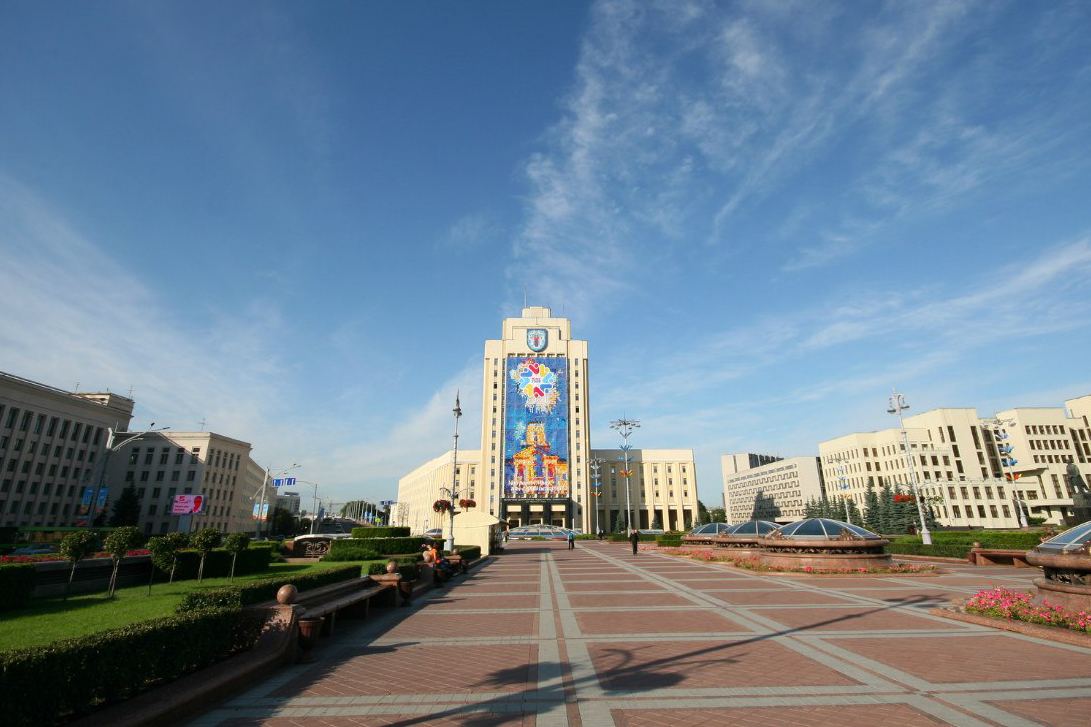 БГПУ история